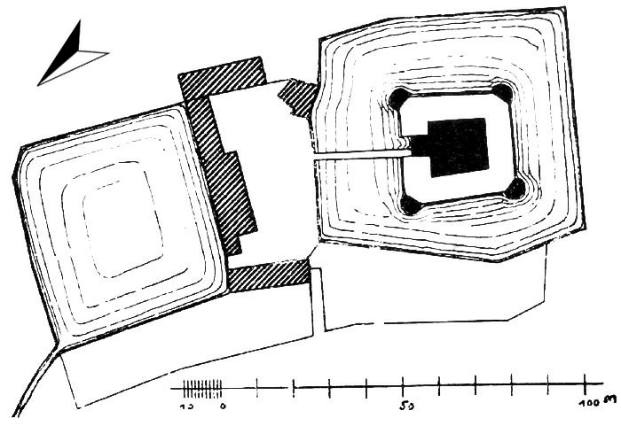 Schematischer Lageplan des Vlattenhauses in Eynatten, Belgien